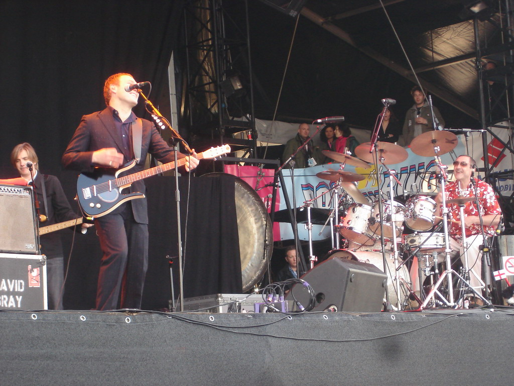 David Gray bei Rock am Ring 2006 auf der Alternastage